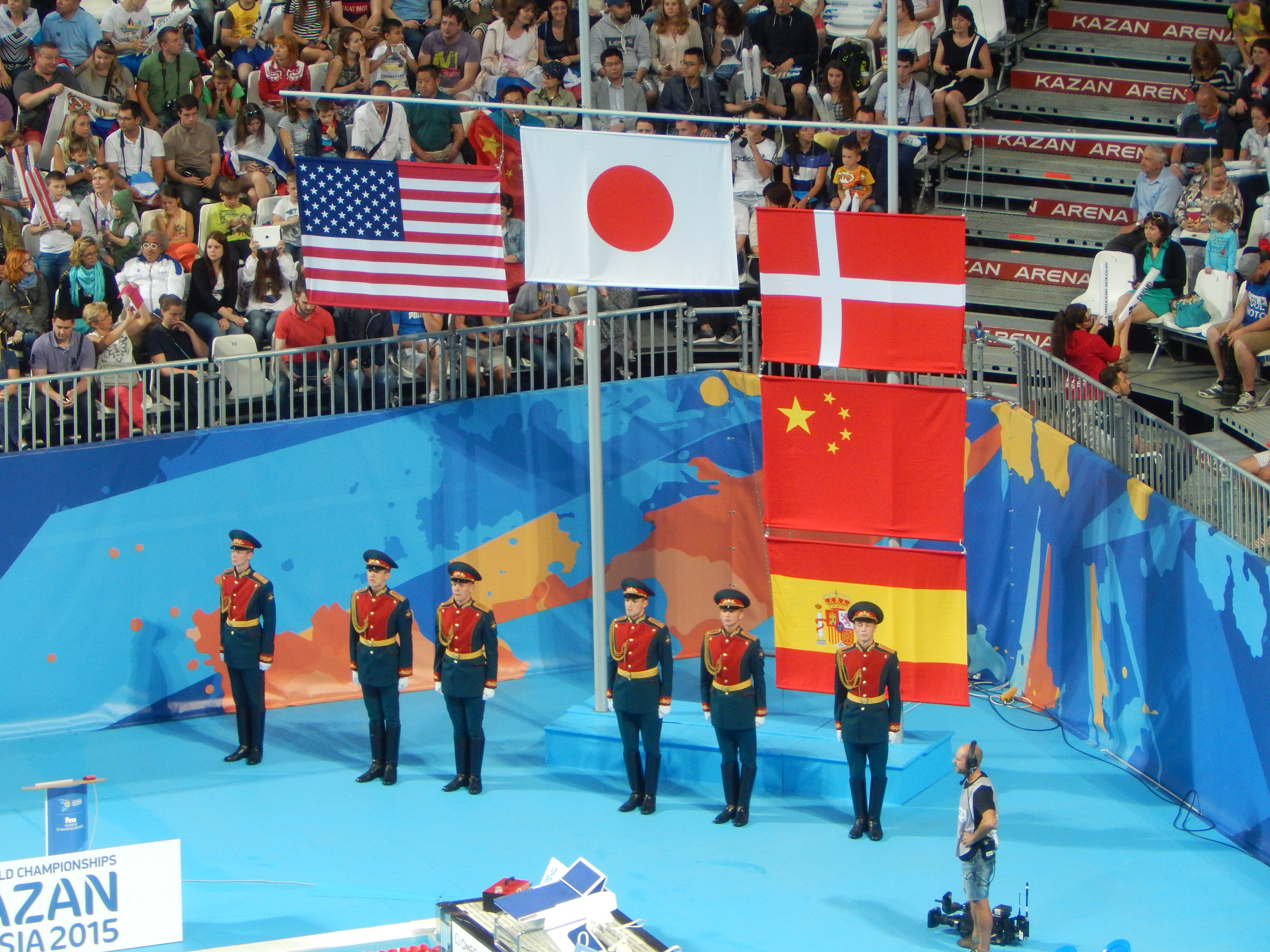 На чемпионате мира в Казани случилось неожиданное и невероятное событие - сразу три пловчихи показали одинаковое время и завоевали бронзовые медали